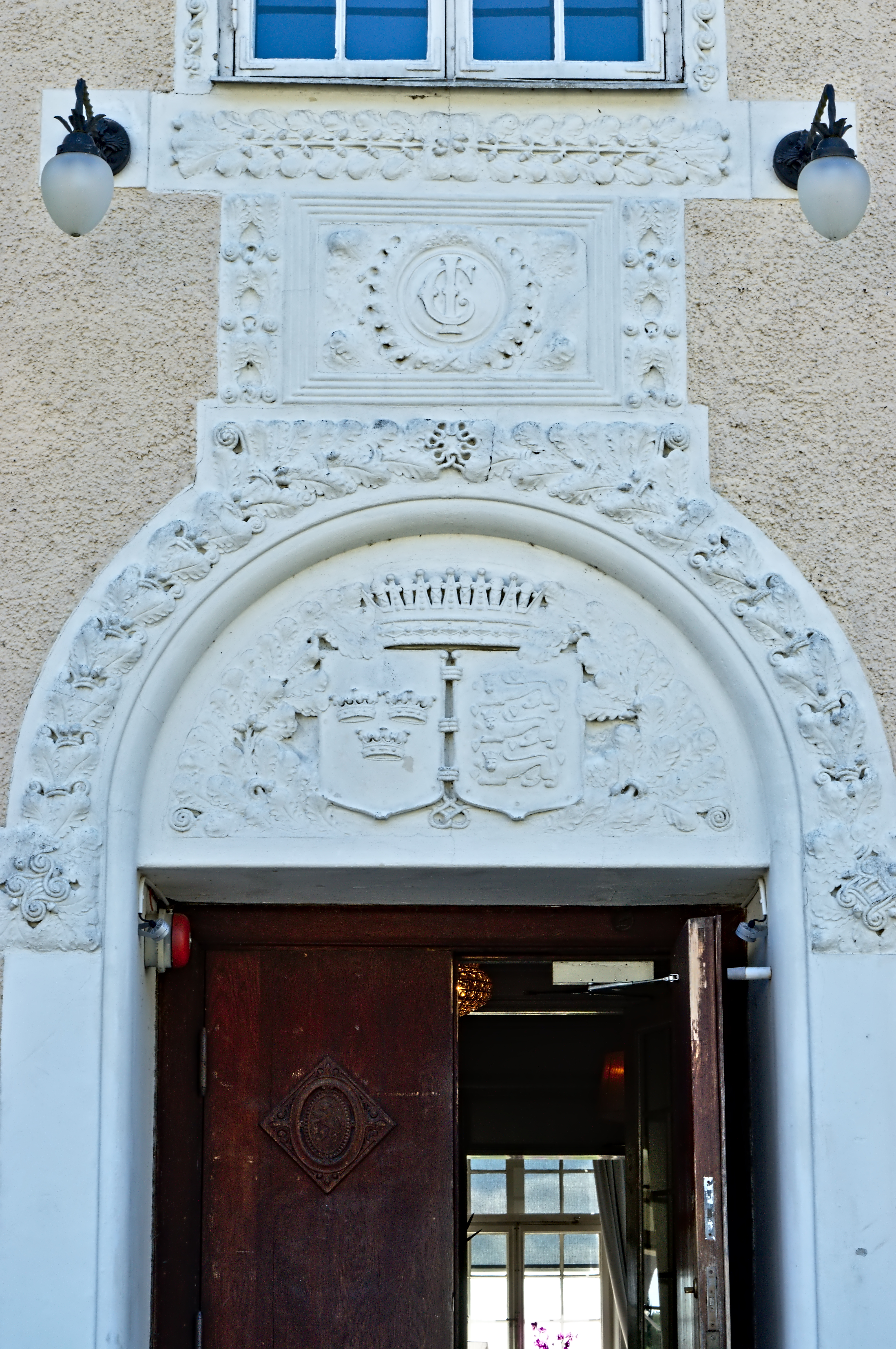 Dörren till Villa Fridhem utanför Norrköping.